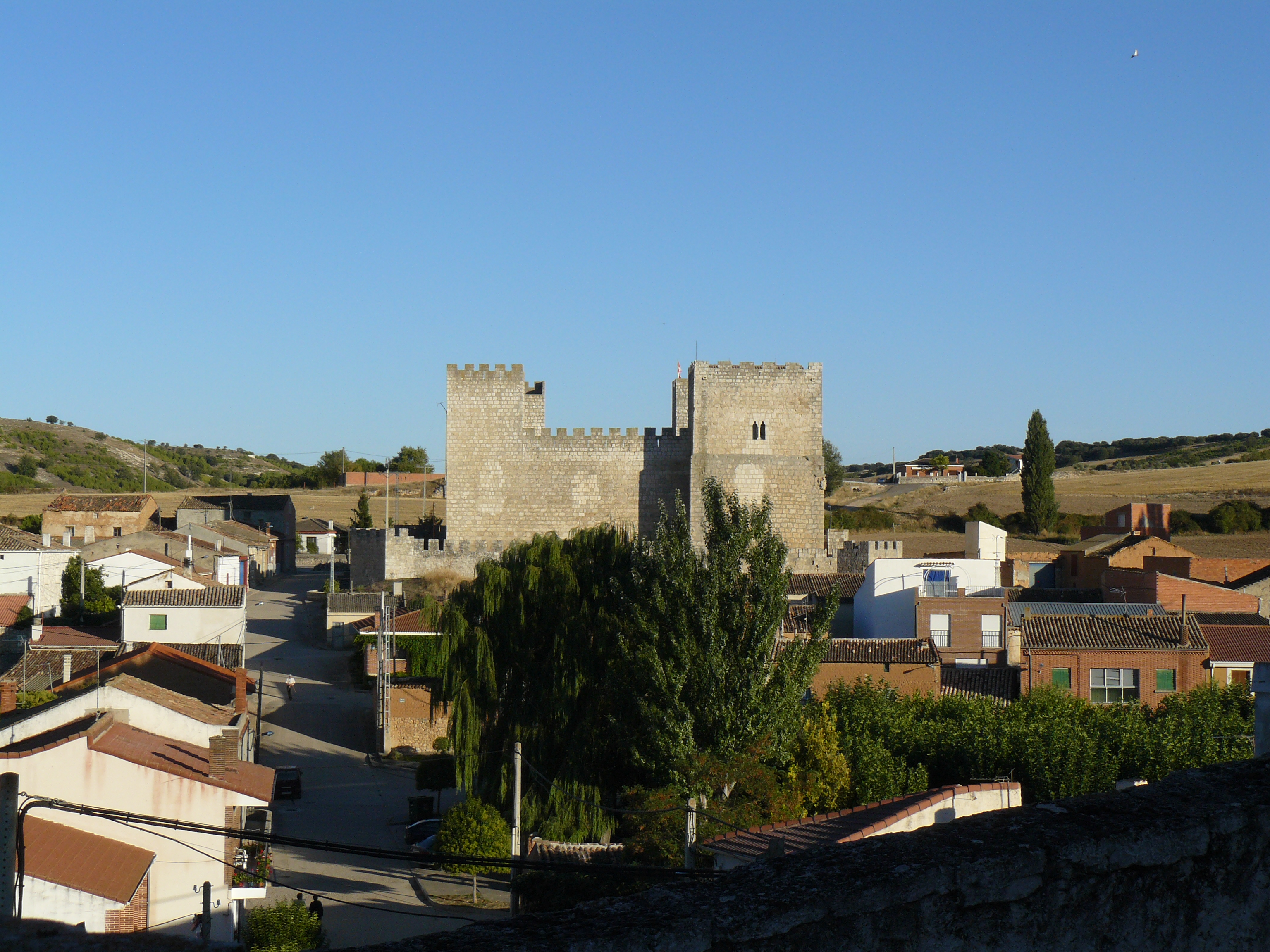 Encinas de Esgueva, Valladolid.